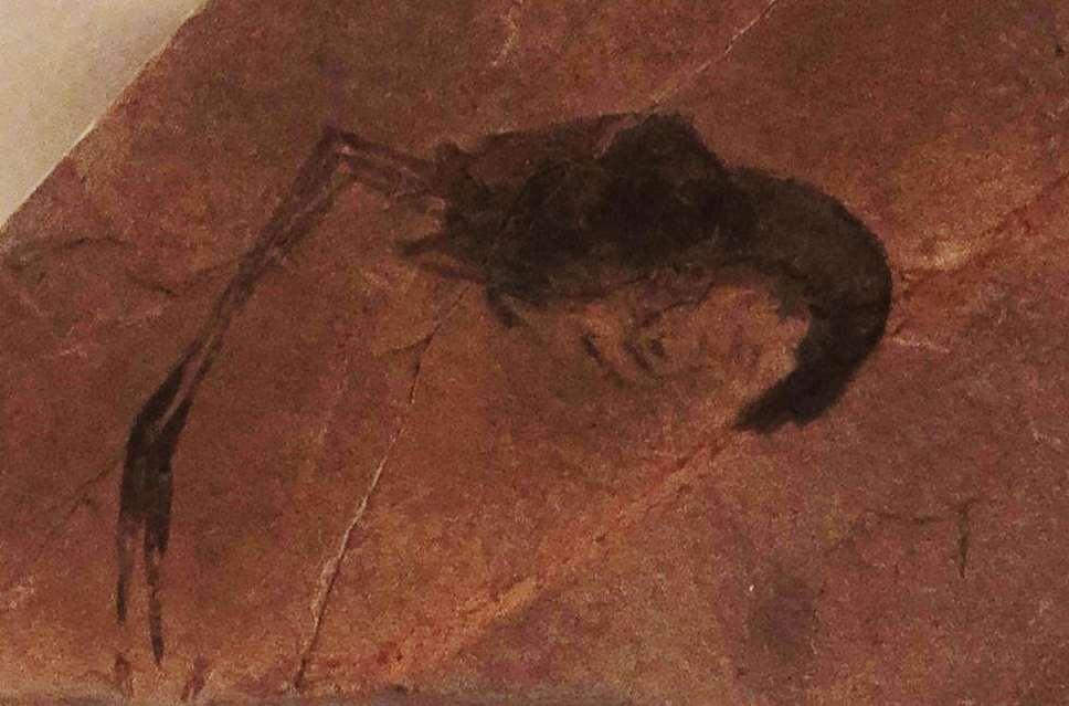 Fossil of Dusa - Museo Paleontologico di Montecchio Maggiore